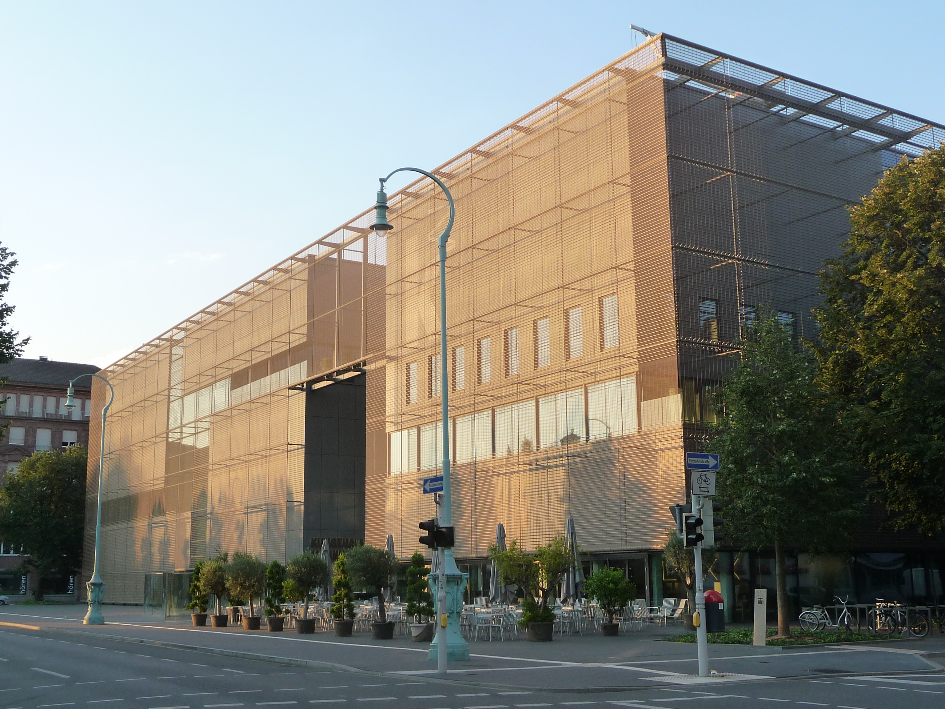 Die Kunsthalle Mannheim ist ein Museum für moderne und zeitgenössische Kunst in Mannheim. Sie prägt seit über 100 Jahren das kulturelle Leben der Industriestadt. Deutschlandweit zählt sie mit Werken von Édouard Manet bis Francis Bacon und einem Skulpturenschwerpunkt – im Spektrum von Auguste Rodin und Wilhelm Lehmbruck über Henry Moore und Marino Marini bis zu Mario Merz und Richard Long – zu den renommiertesten bürgerschaftlichen Sammlungen der deutschen und internationalen Moderne bis zur Gegenwart.